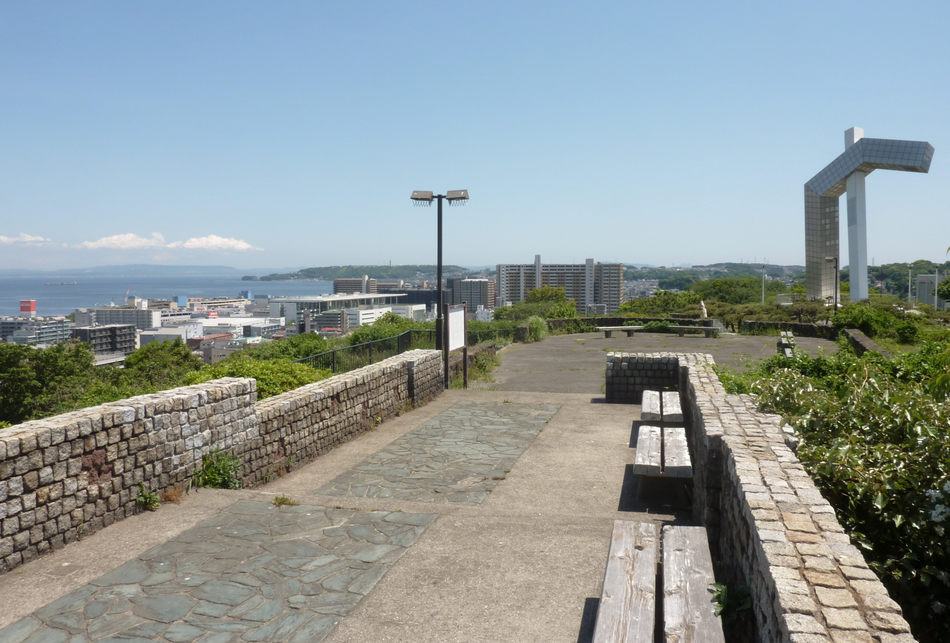 中央公園の展望台より南東方向を望む（神奈川県横須賀市）